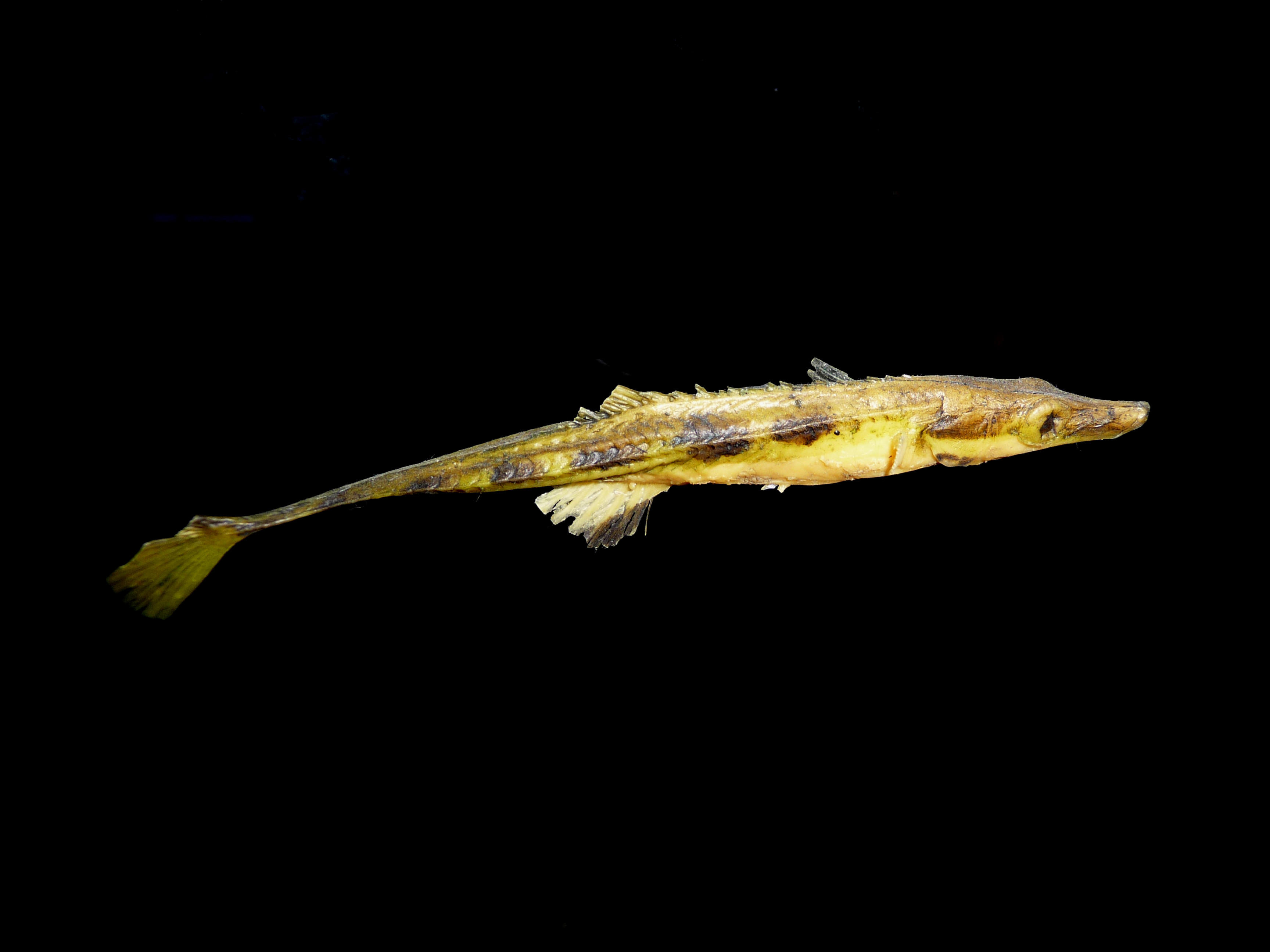 Épinoche de mer (Spinachia spinachia) naturalisé.